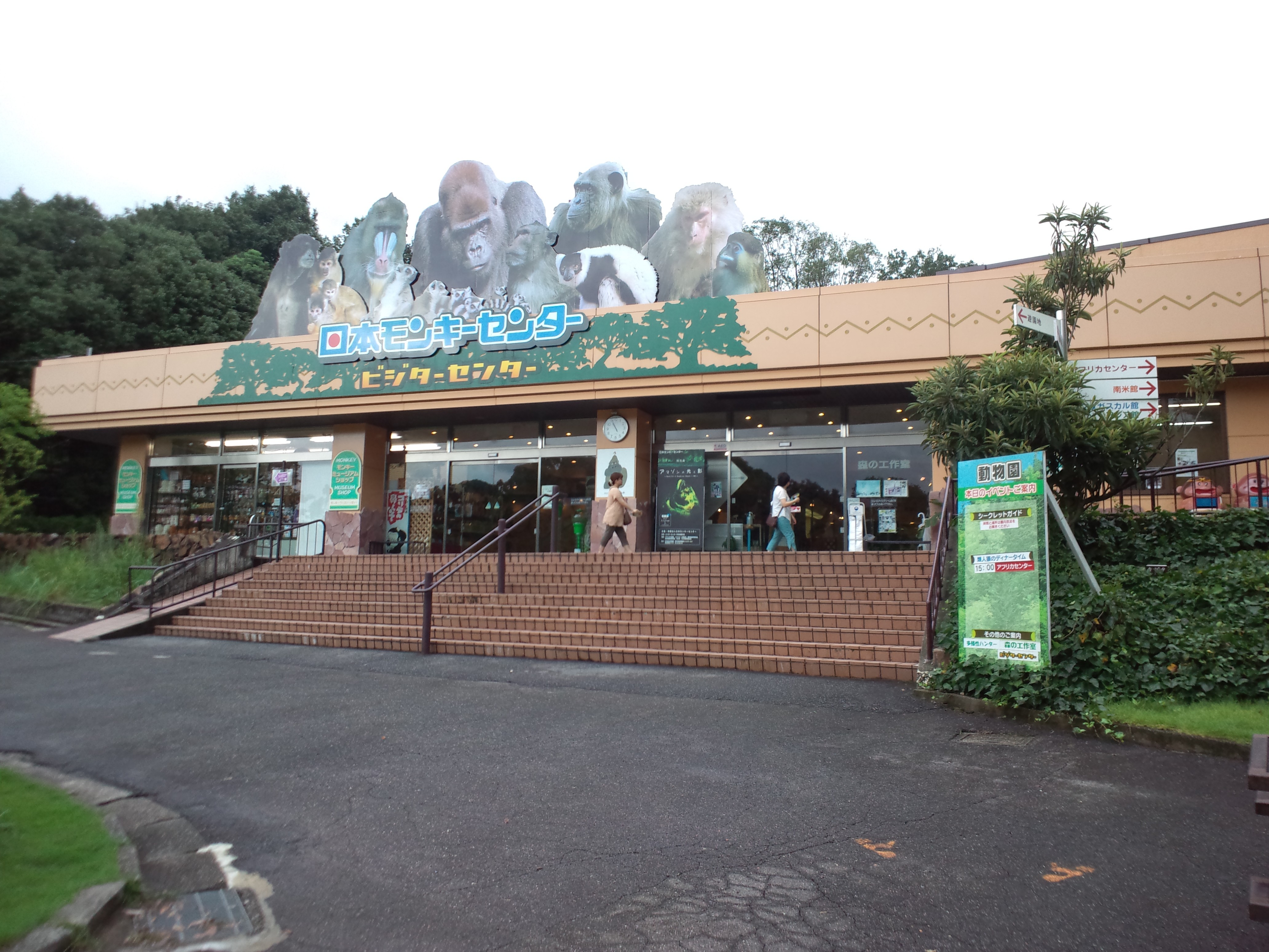 日本モンキーセンター ビジターセンター